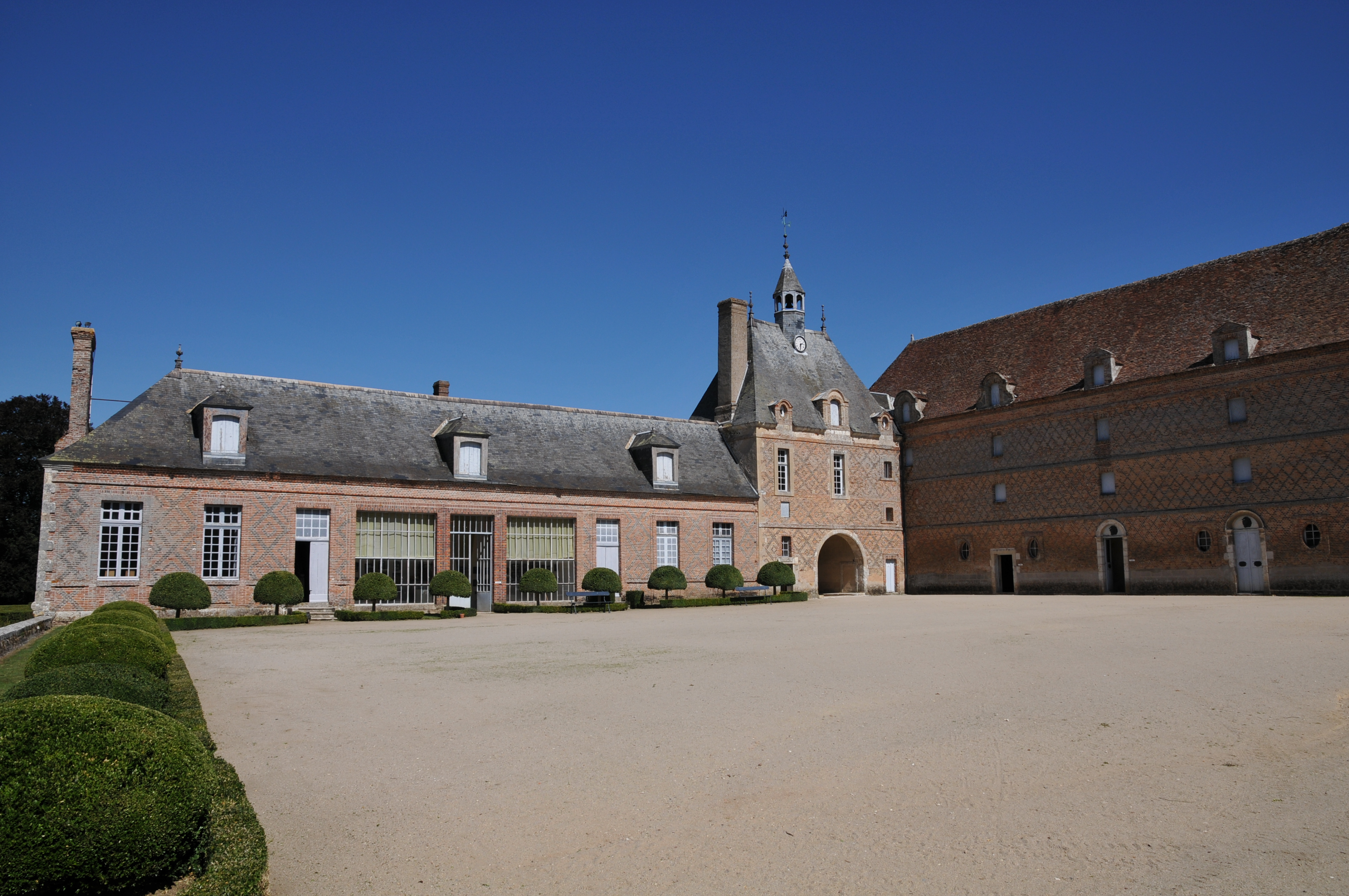 Schloss La Bussière, Nord- und Ostflügel der Vorburg